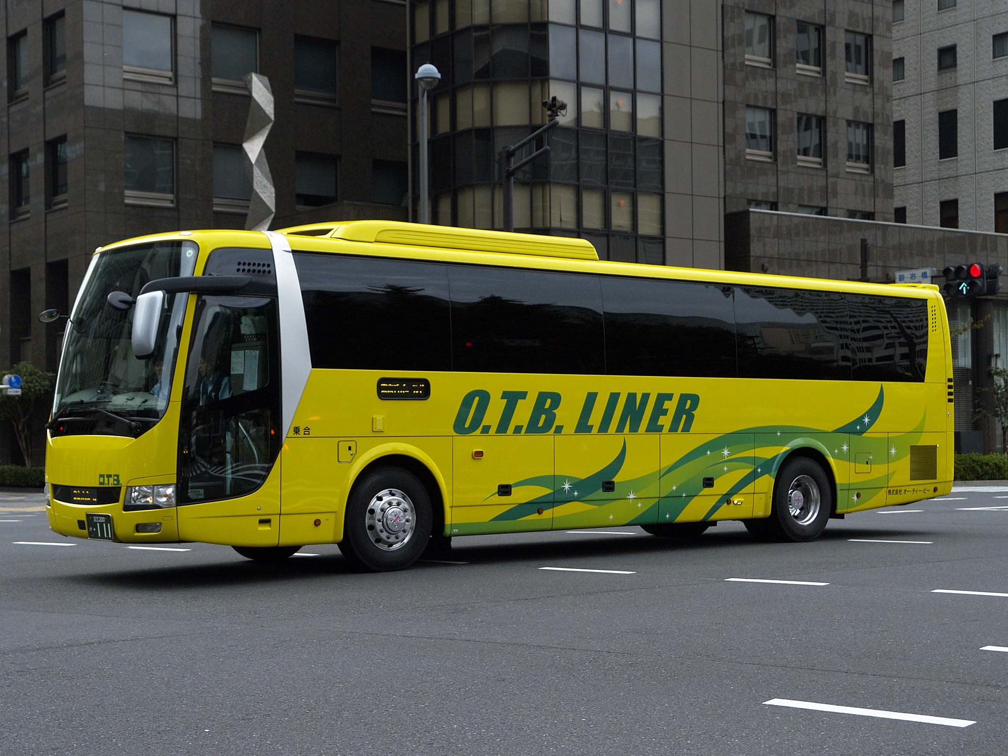 オー・ティー・ビーの高速バス車両の一例。 登録番号：足立200け・111 撮影地：東京都中央区、鍛冶橋交差点